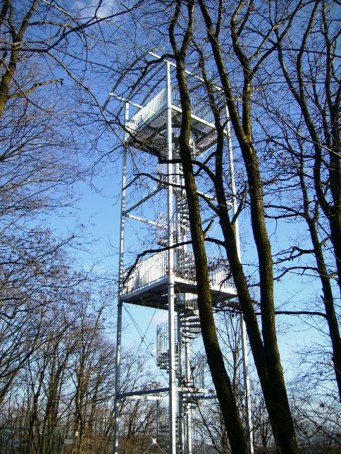 Rozhledna na Stromě v brněnských Soběšicích